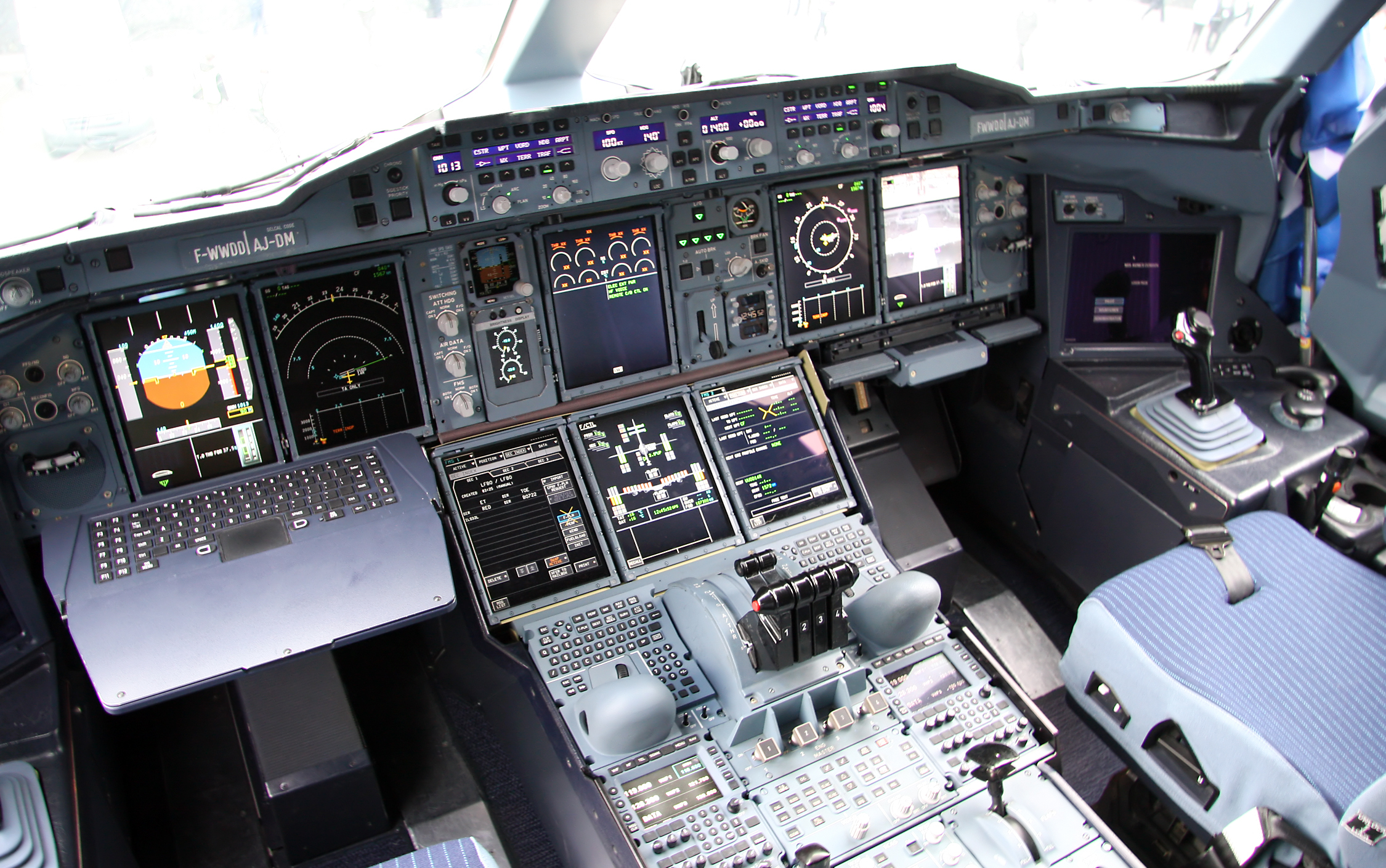 Кабина (Cockpit)